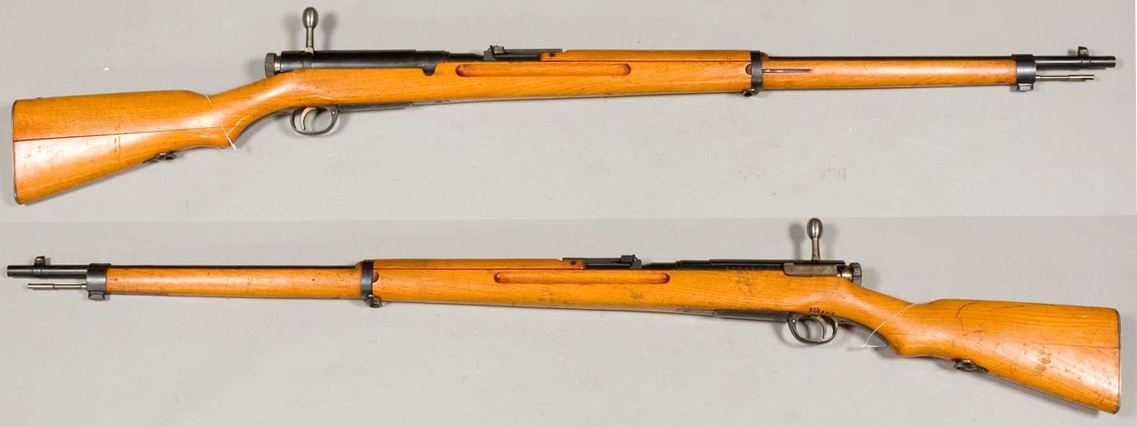 Japonska repetirka tip (model) 38, uvedena leta 1905.